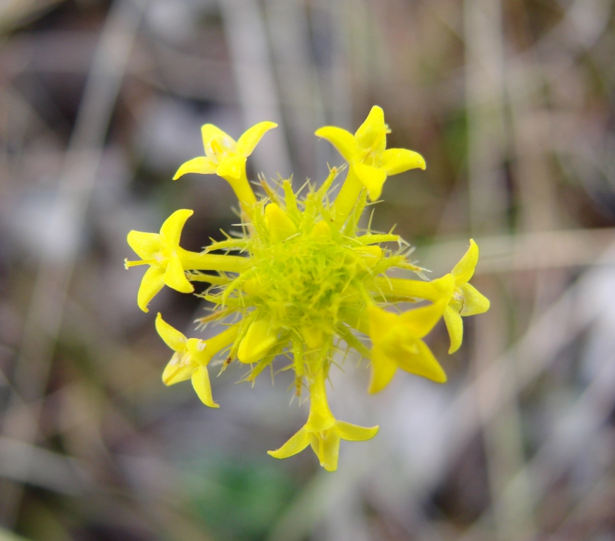 Perama hirsuta - RUBIACEAE Chapada dos Veadeiros - Cavalcante - Goiás - Brasil